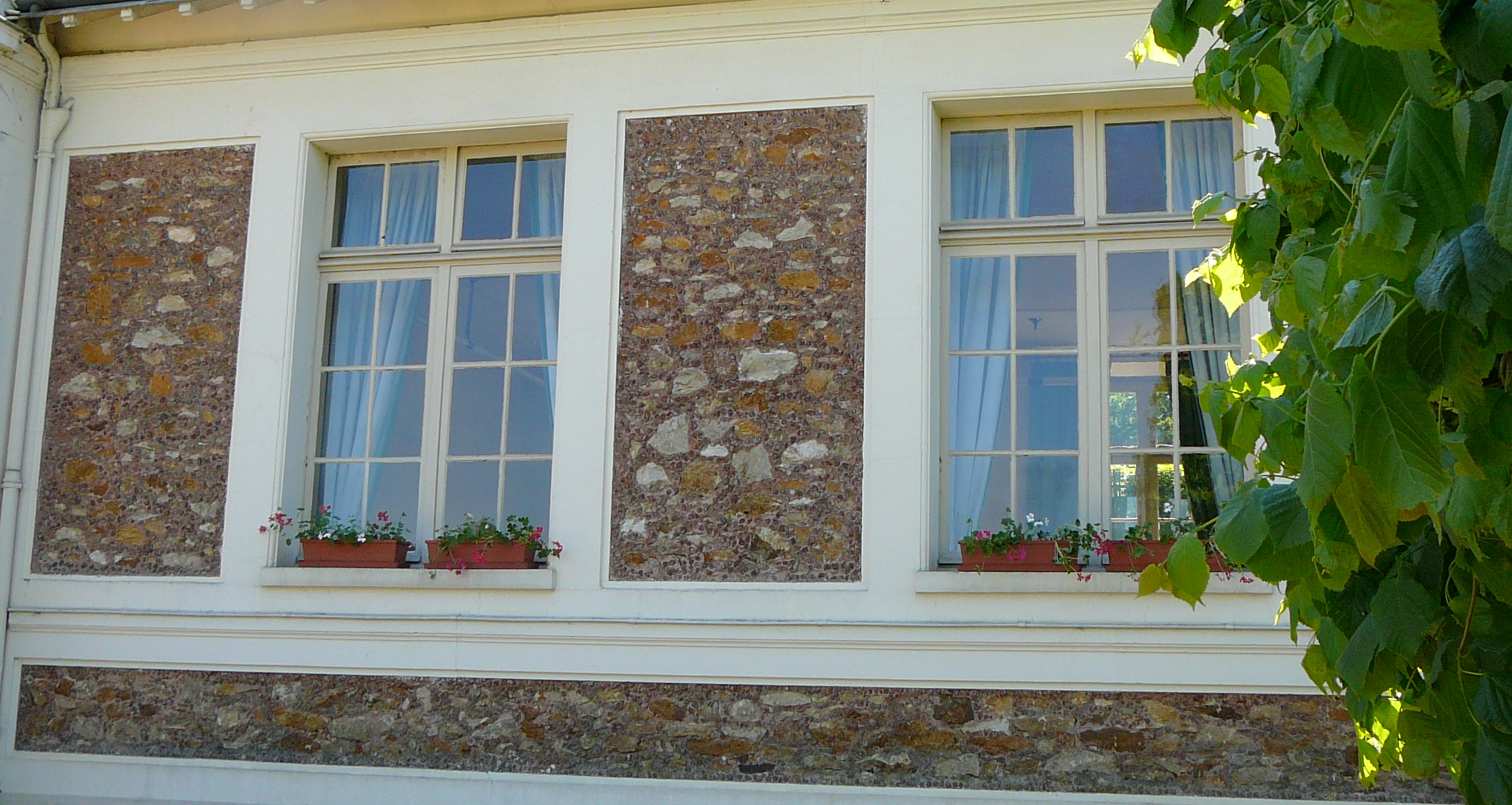 Façade de la Mairie de Cély en Bière (France) avec des panneaux réalisées en pierre de Meulière ornée par des joints en rocaillage.